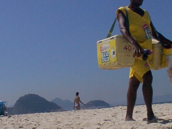 Rio de Janeiro